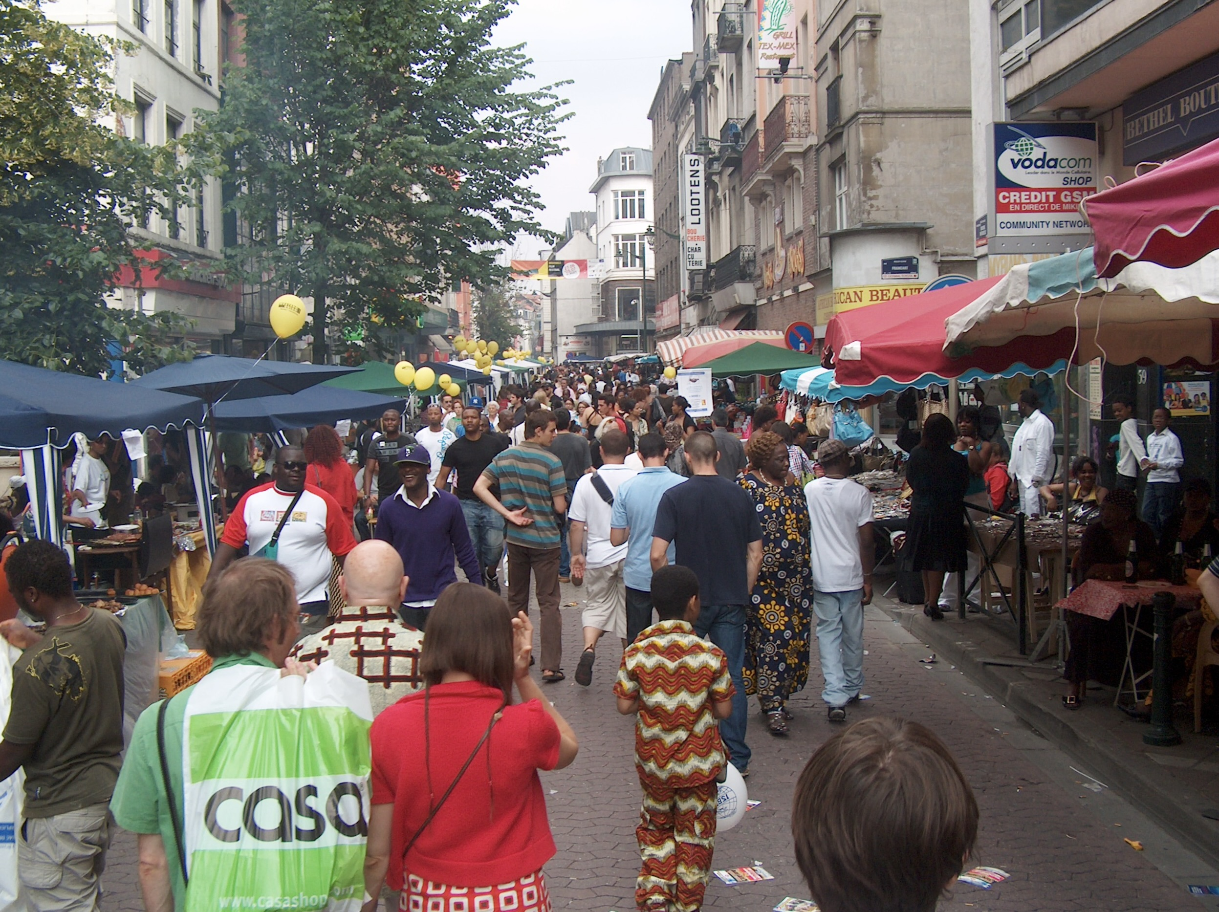 La fête Matonge en Couleurs 2009 à Ixelles, Bruxelles, Belgique.